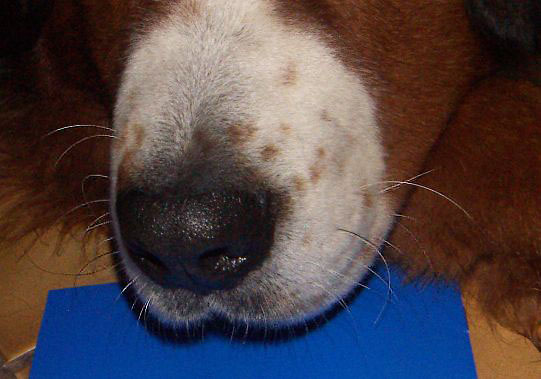 Vibrissen Dog